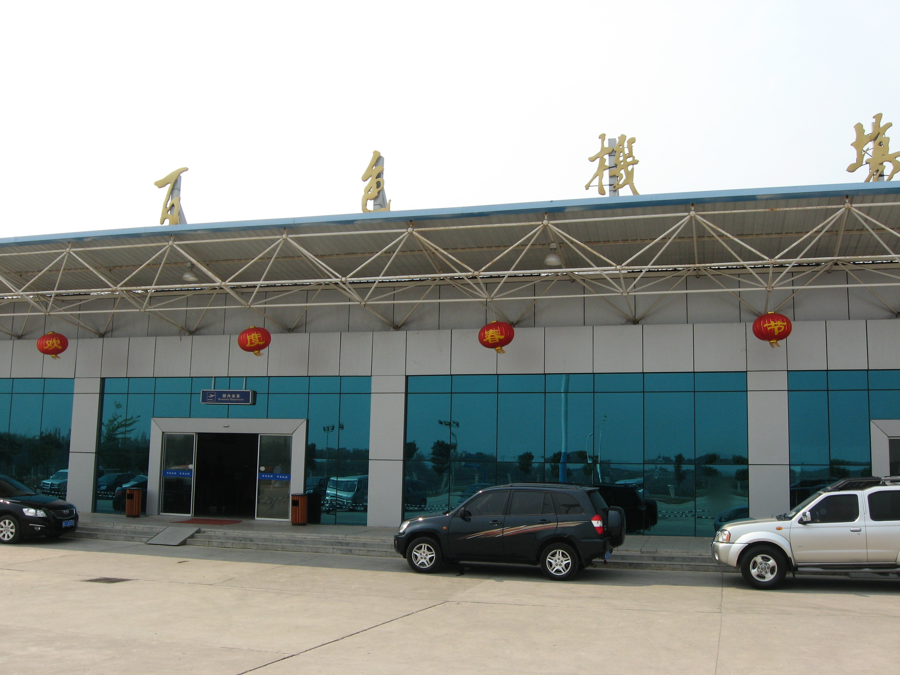 百色右江机场航站楼